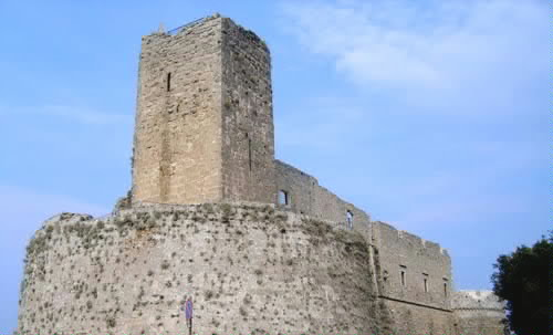 Castello normanno svevo aragonese di Monte Sant'Angelo